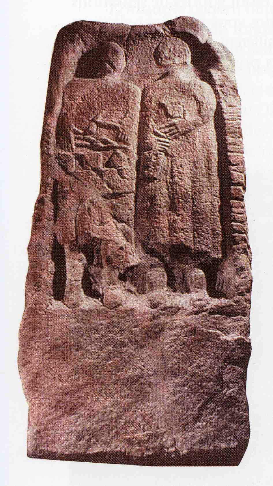 Stèle du maître de forge (grès rose, en provenance du Camp celtique de la Bure, près de Saint-Dié-des-Vosges)